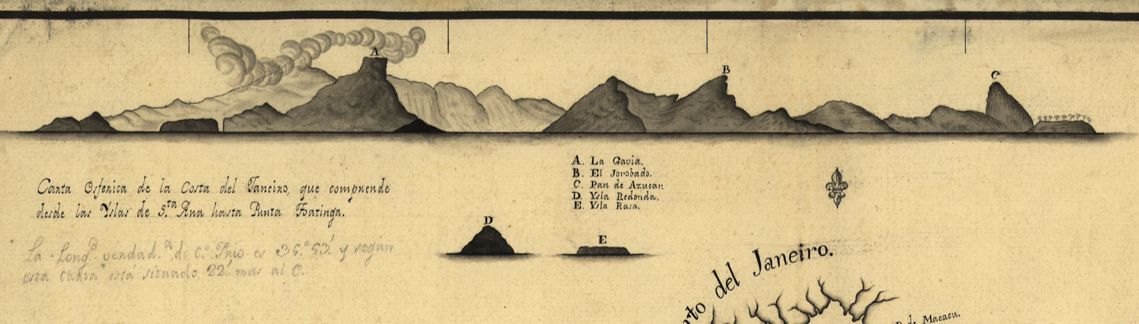 Detalle del perfil de la costa que aparece en la parte superior de la carta.